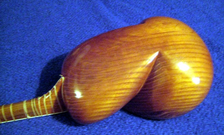 Tar